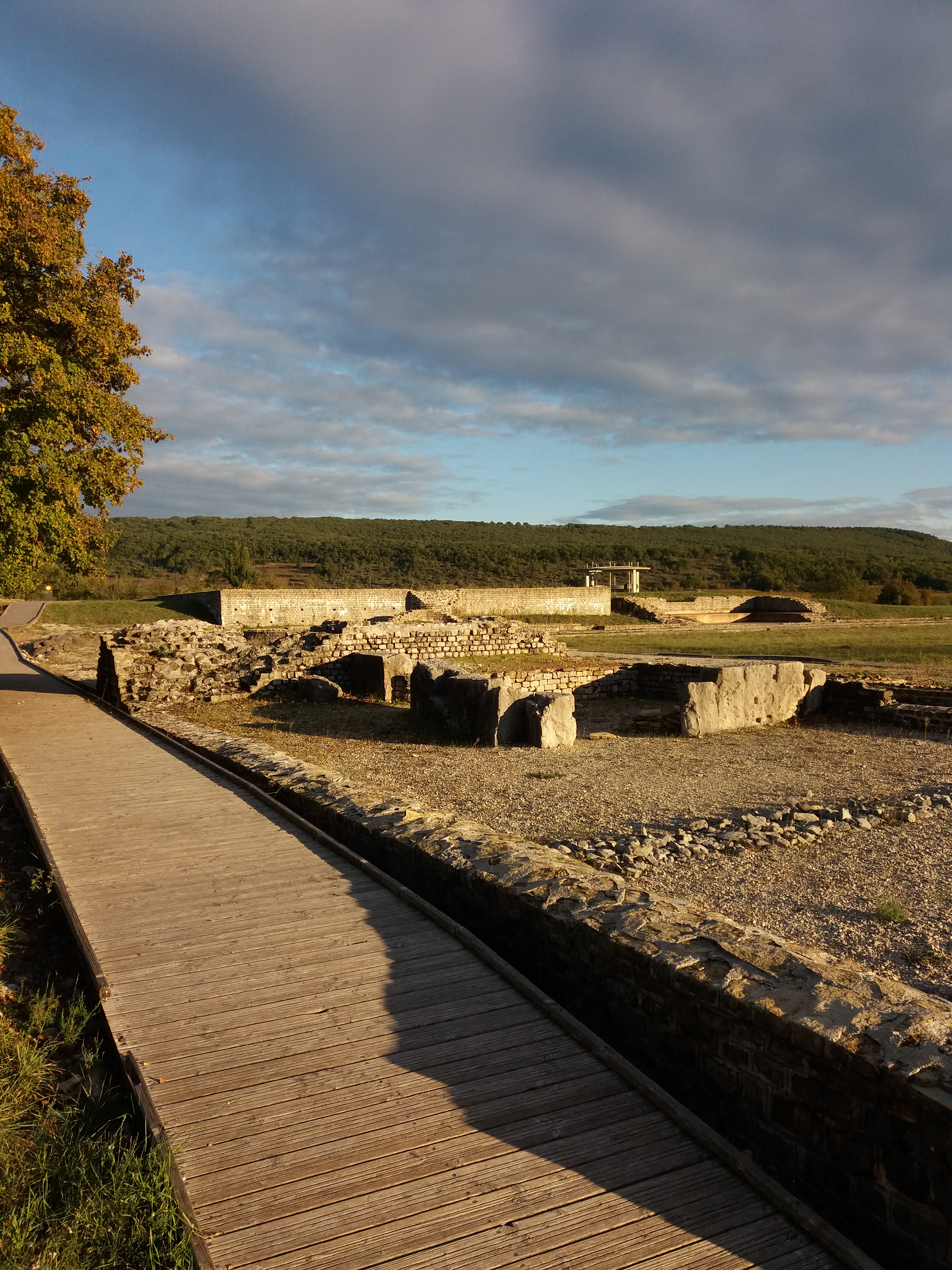 Ruines d'un temple.